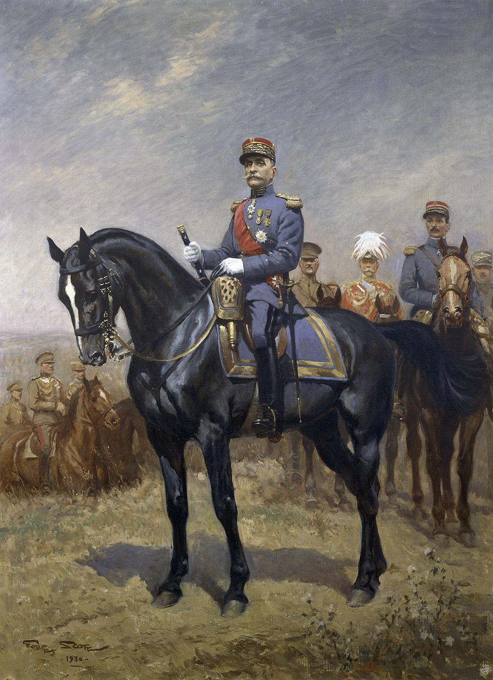 Portrait officiel du Maréchal Foch